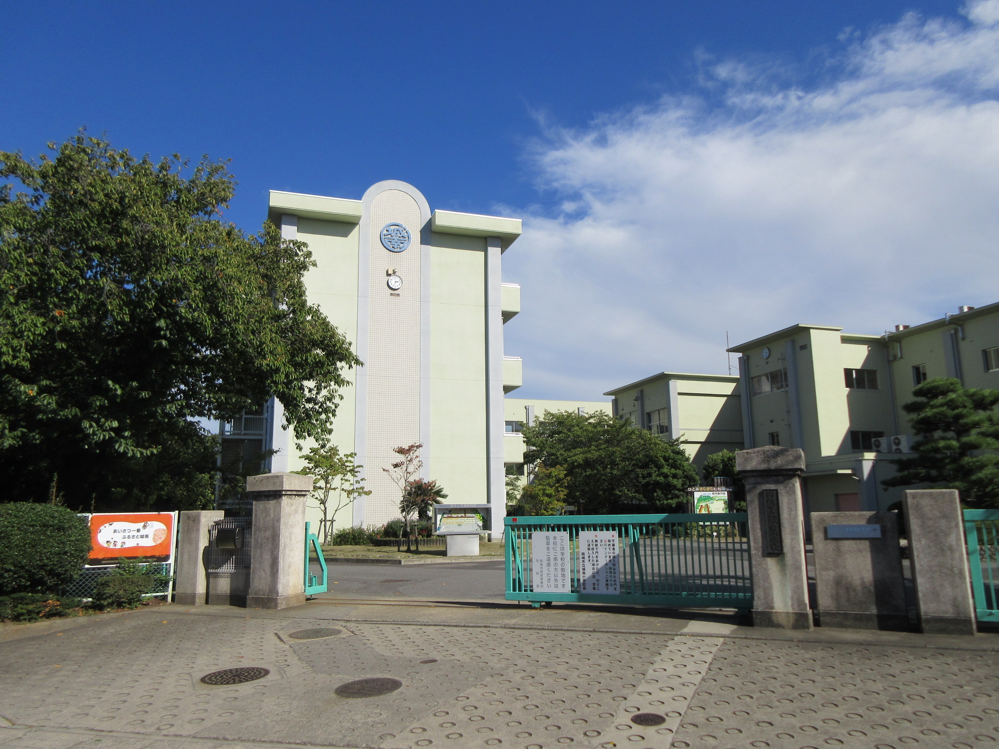 岡崎市立城南小学校（岡崎市城南町）